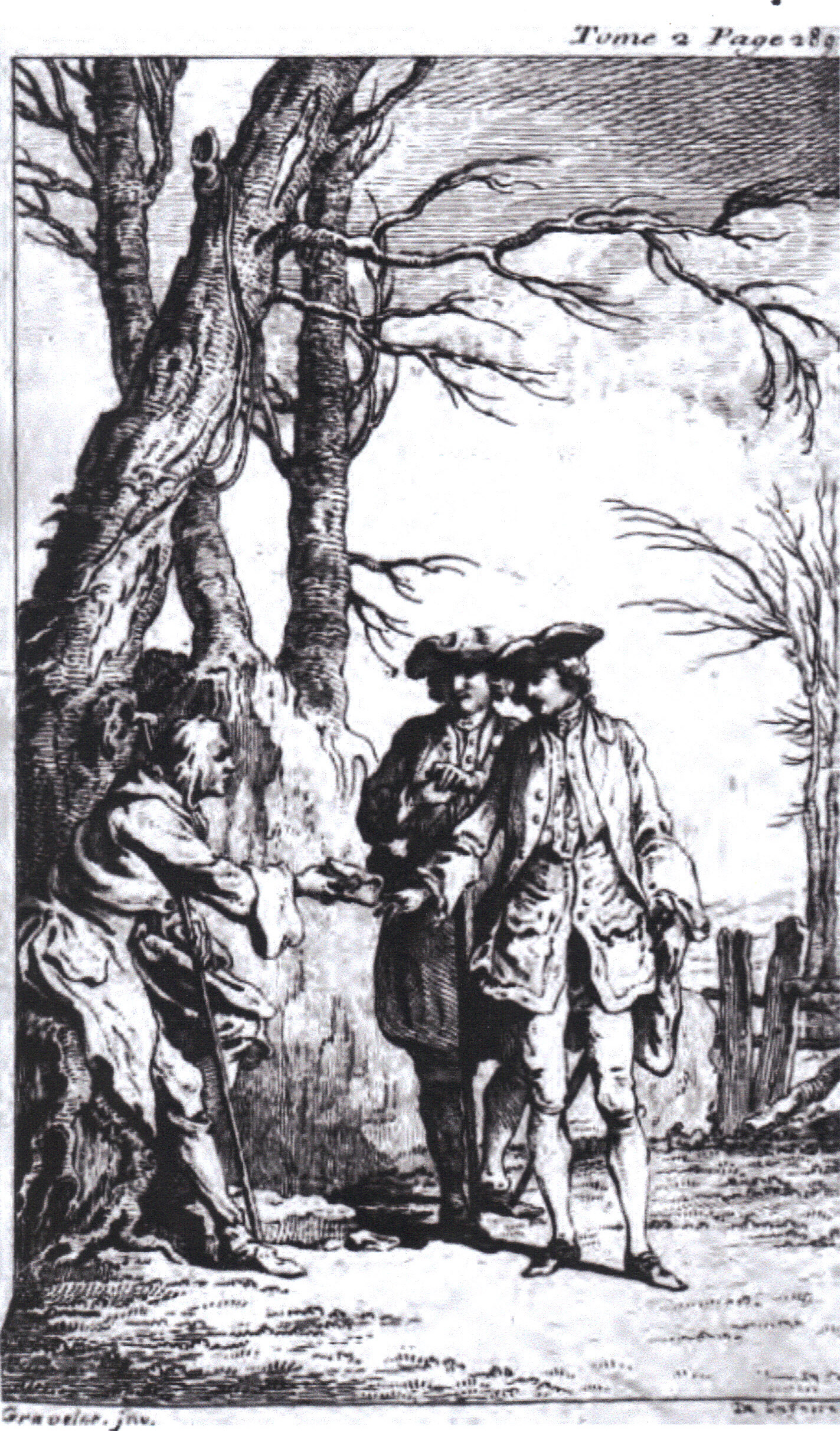 Première traduction de Tom Jones en français, tome II. Estampe de Gravelot illustrant le texte de la page 289 : un mendiant, à qui Tom vient de faire l'aumône « tira alors de sa poche un petit portefeuille doré qu'il remit entre les mains de Jones ».